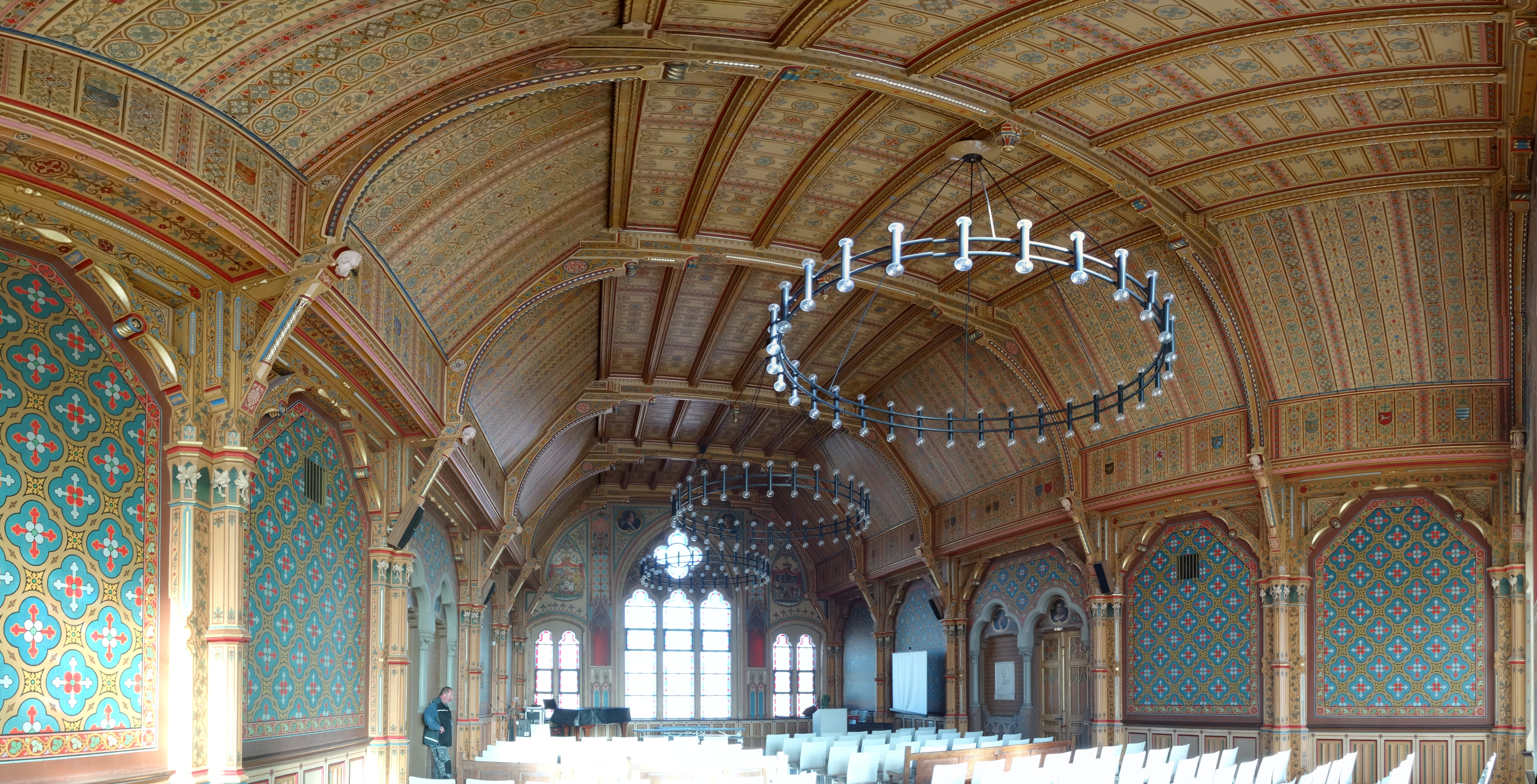 die neoromanische Aula des Geschwister-Scholl-Gymnasiums, Innenraum-Panorama